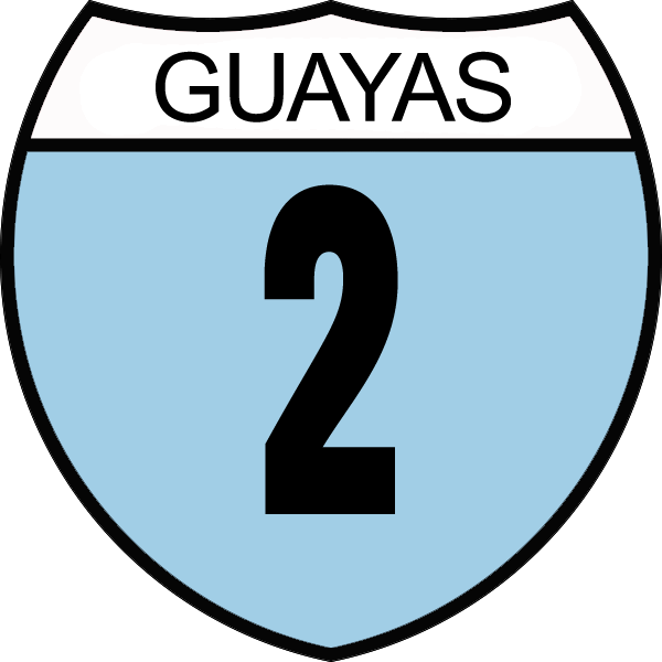 Disco de Identificación Ruta Provincial Guayas 2